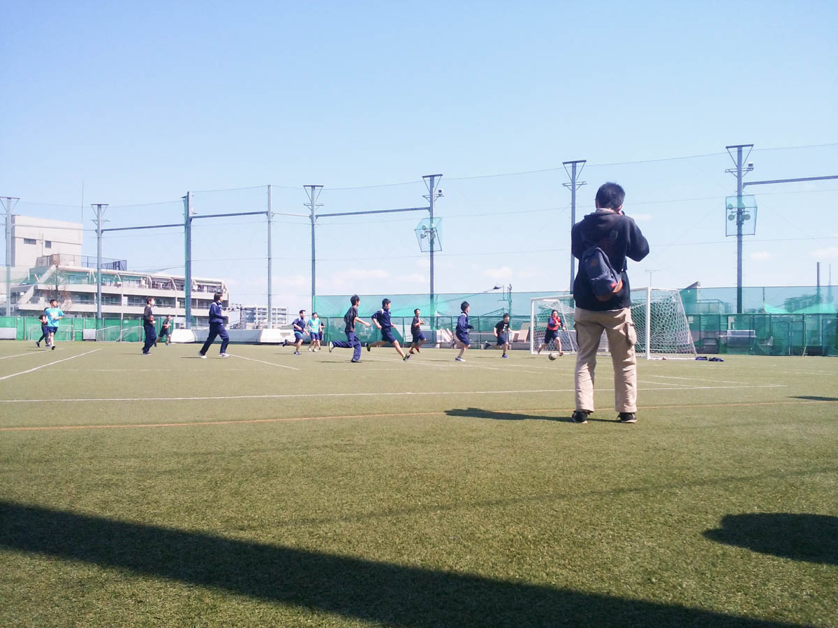 東京都立竹早高等学校、球技大会